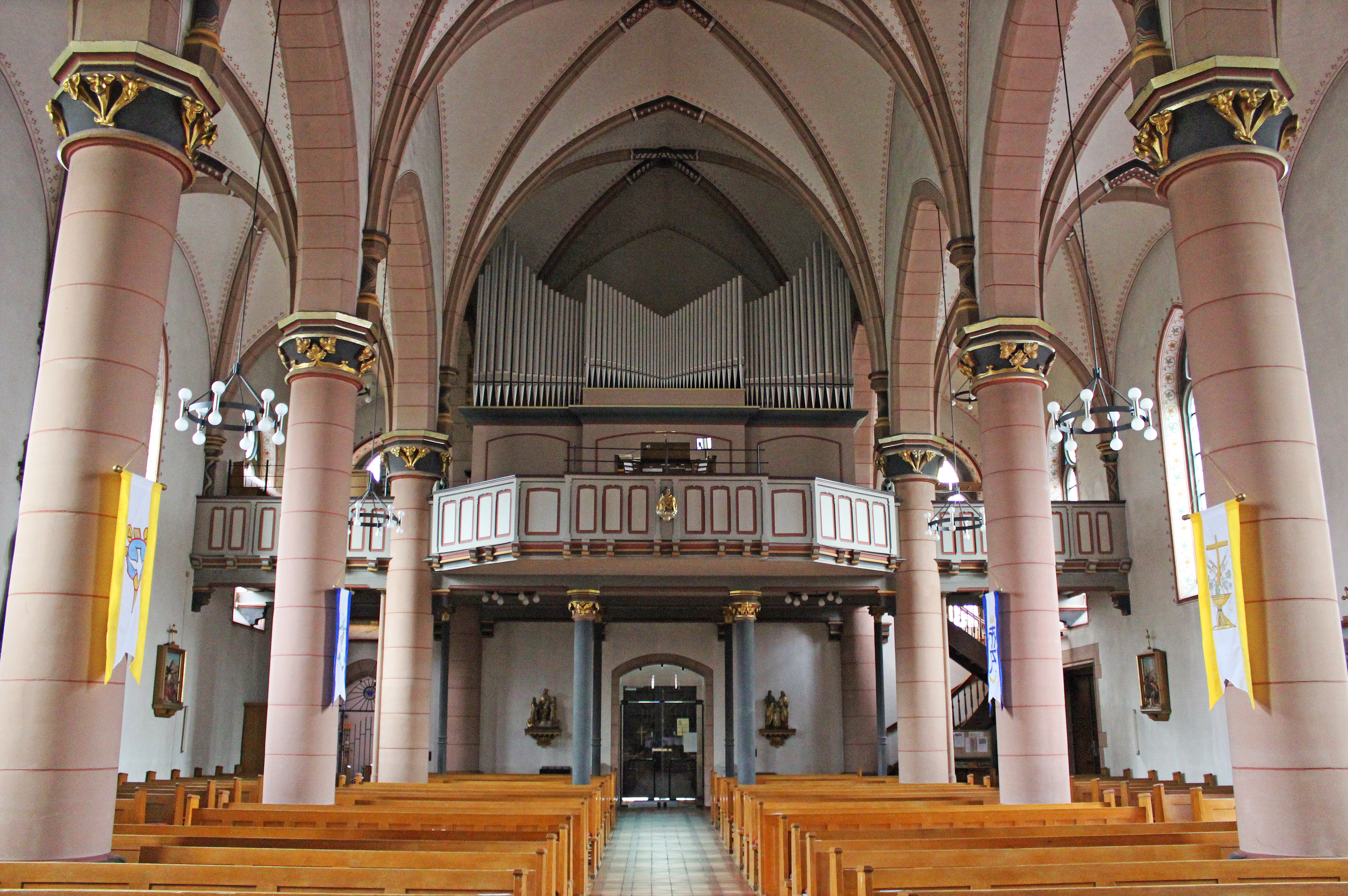 Blick ins Innere der katholischen Pfarrkirche St. Gangolf in Differten, Gemeinde Wadgassen, Landkreis Saarlouis, Saarland